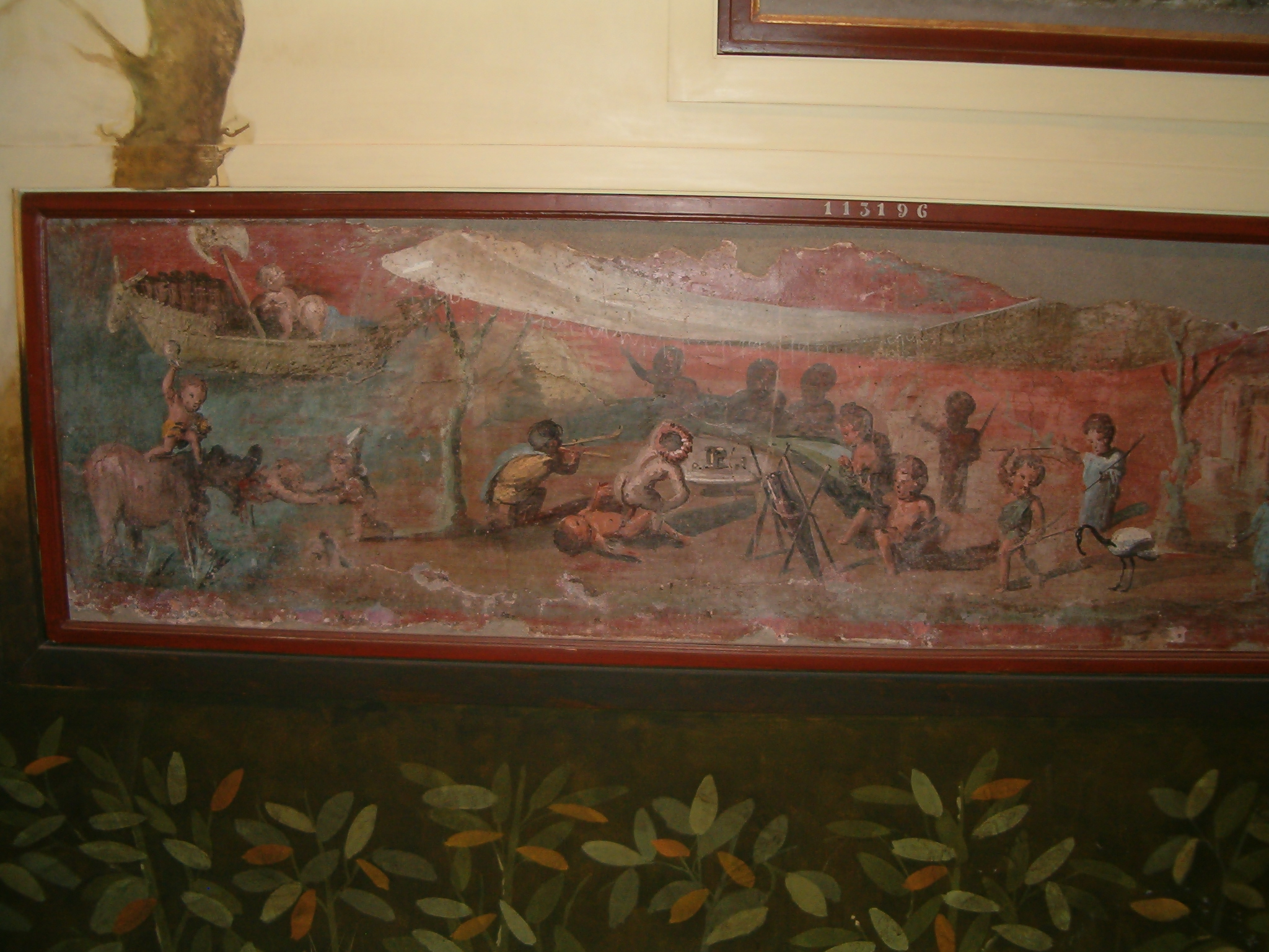 Napoli, Museo Archeologico Nazionale. "Gabinetto Segreto" (inv. nr. 113196). Aspetto caricaturale dell'erotismo antico: scena con un gruppo di pigmei che durante un banchetto all'aperto assistono ad uno spettacolo sessuale nel mentre un altro viene divorato da un ippopotamo ed una coppia è intenta ad un rapporto sodomitico su di una barca di giunco. Da Casa del medico, Pompei, VIII.5.24